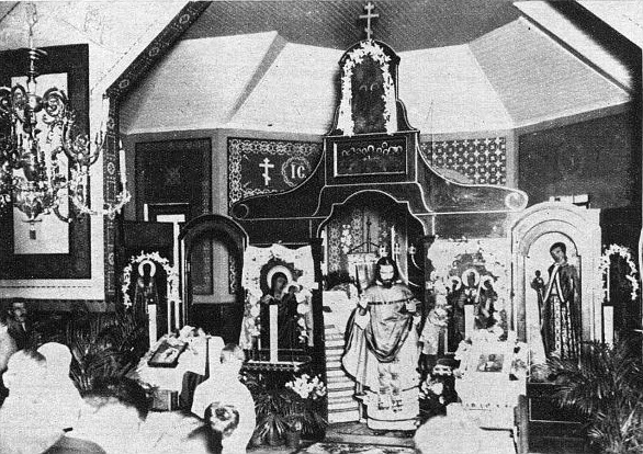 Часть алтаря во время первой Литургии в Свято-Троицкой церкви в 1931 году